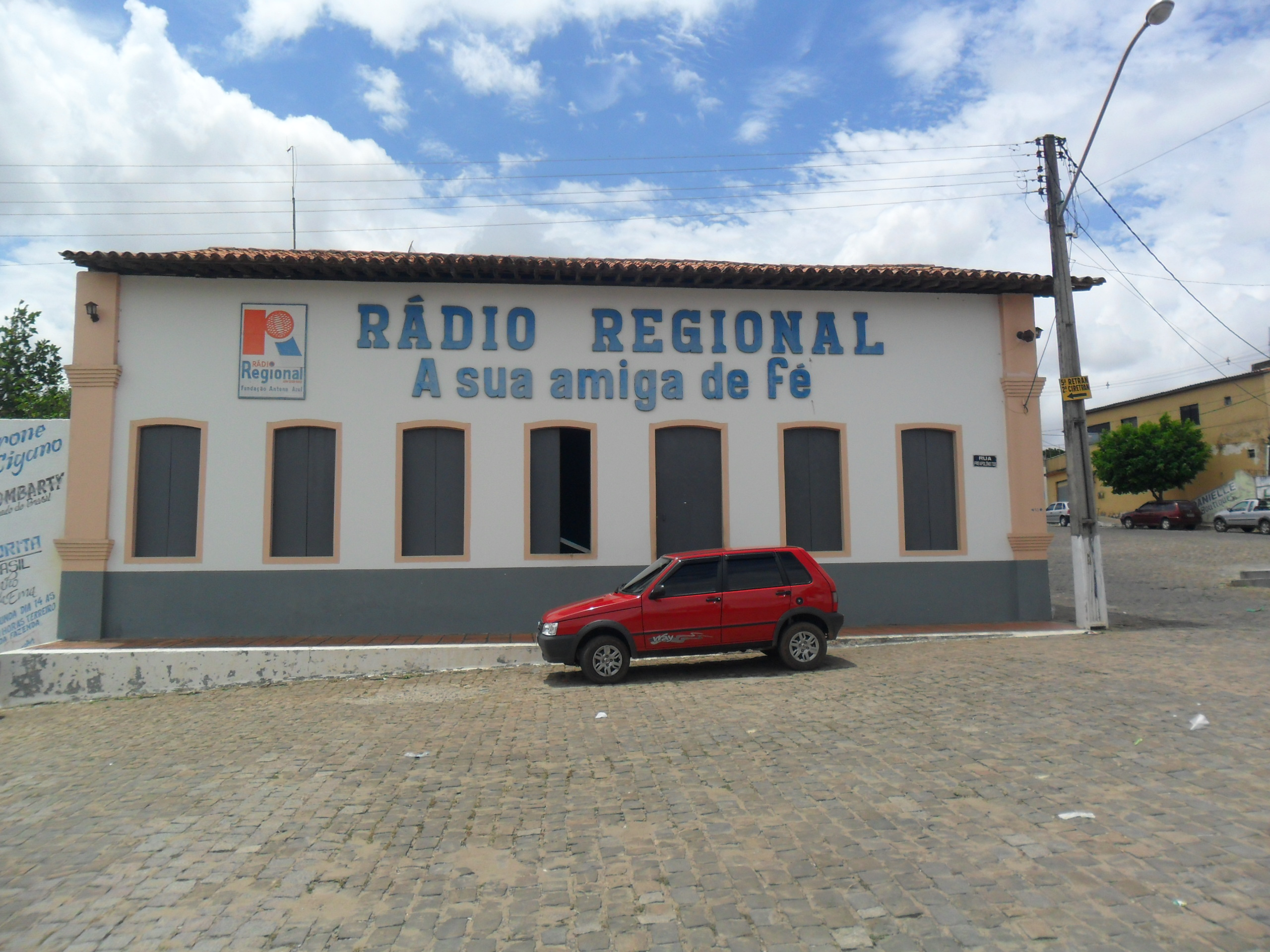 Rádio Regional sua amiga de fé.